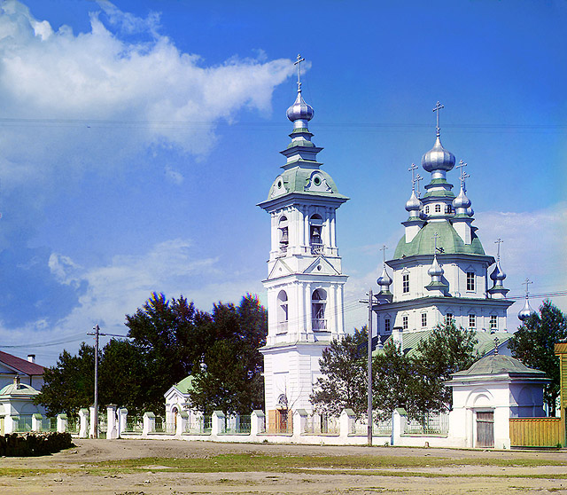 A church in Petrozavodsk, ca. 1912.